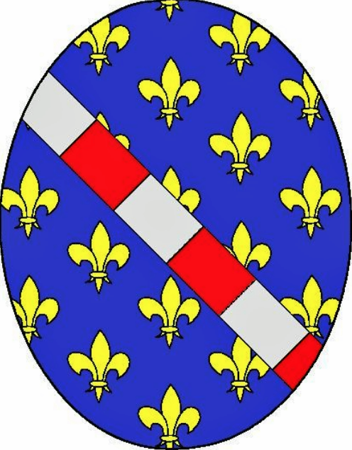 Blason de Marie d'Évreux